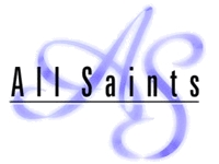 Logo der australischen Dramaserie All Saints